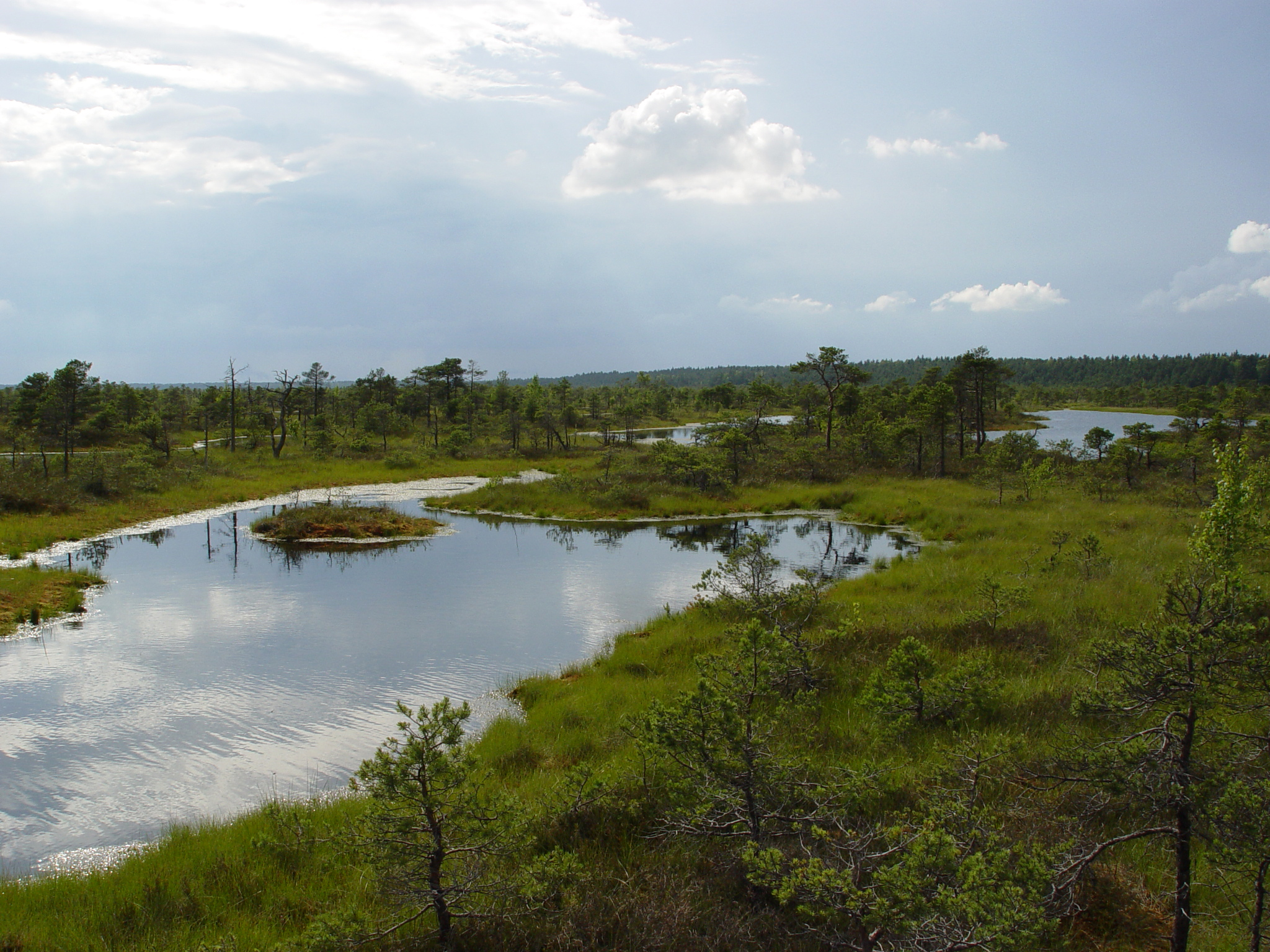 Great Kemeri Bog